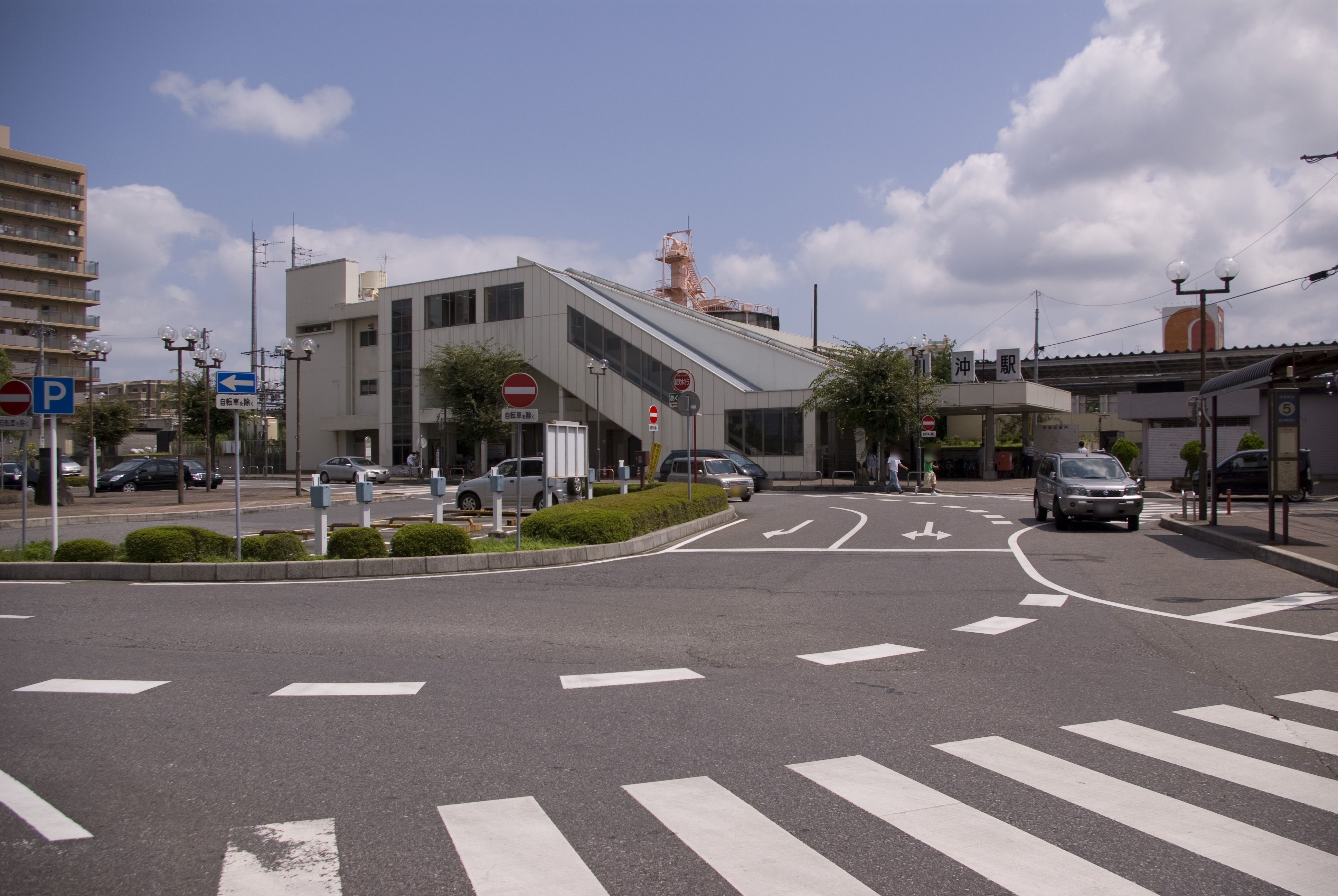 JR常磐線荒川沖駅